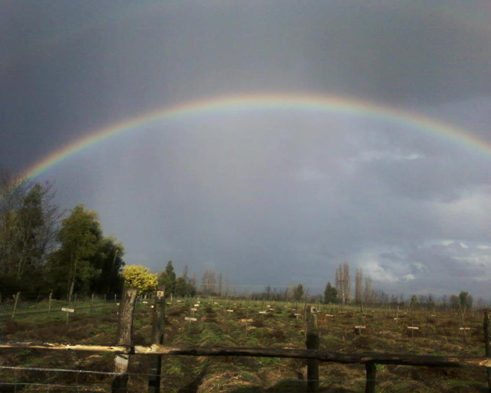 Invierno